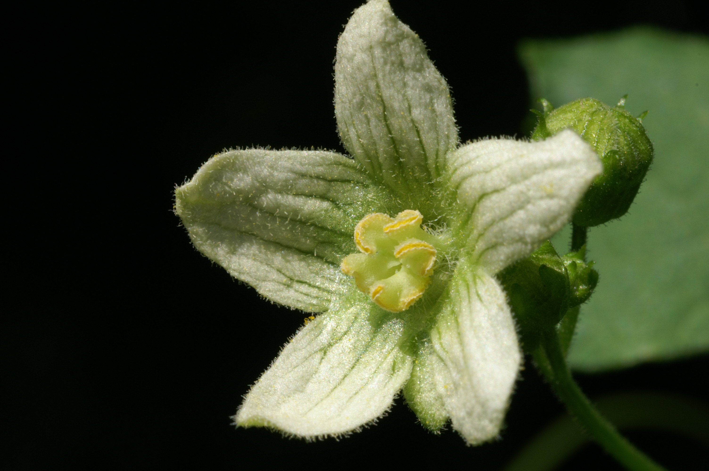 Gegenstand: Blüte der Roten Zaunrübe (Bryonia dioica), ca. 15 mm Durchmesser